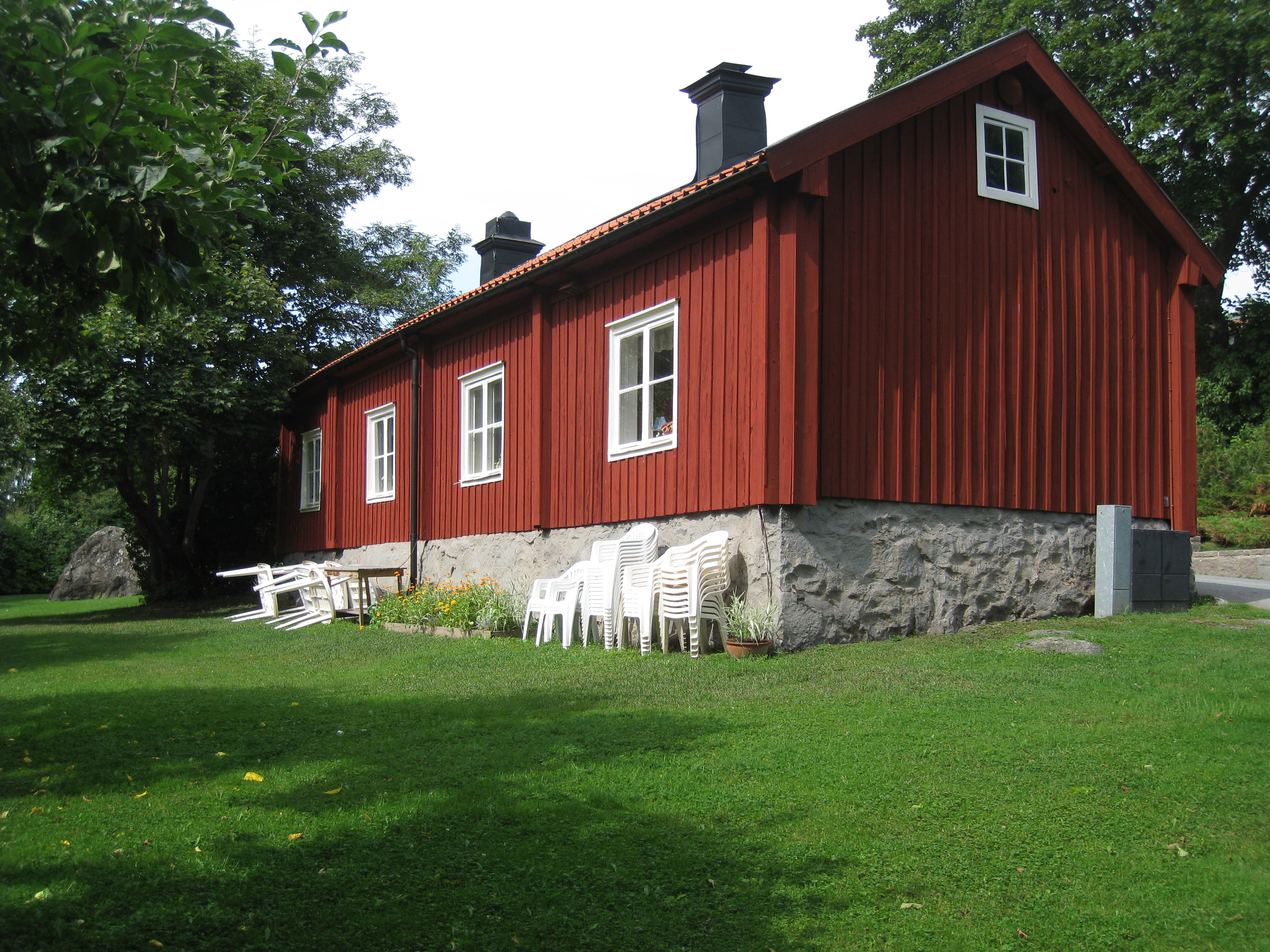 Gamla Klockargården vid Bromma kyrka, Bromma, Stockholm, östra gaveln.